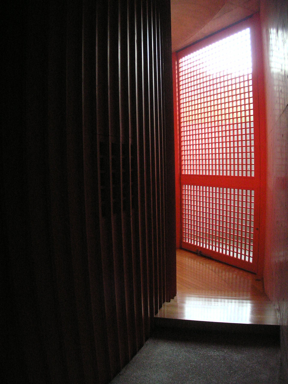 本福寺水御堂（ほんぷくじみずみどう） 本福寺は、平安時代後期に創建された真言密教の寺院で真言宗別格本山。水御堂はその本堂で1991年竣工の安藤忠雄設計による鉄筋コンクリート造の寺院建築。第34回建築業協会賞を受賞。 ～photo by Autumn Snake 【おぉたむ すねィく探検隊】写真部門 担当 大原佳苗